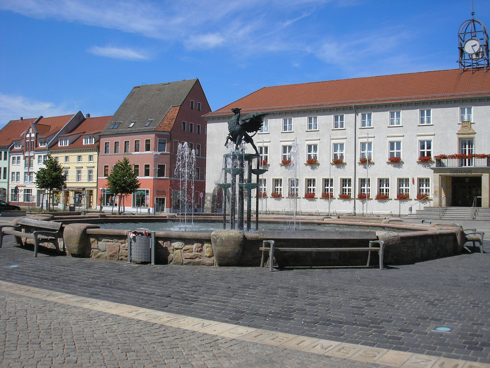 Blick über den Marktplatz in Anklam (Vorpommern).